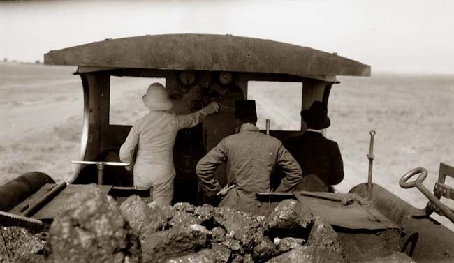 פתיחת קו הרכבת יפו-ירושלים לאחר הרחבתו, 1920 - ייתכן שהג'נטלמן בתמונה הוא הנציב הבריטי הרברט סמואל